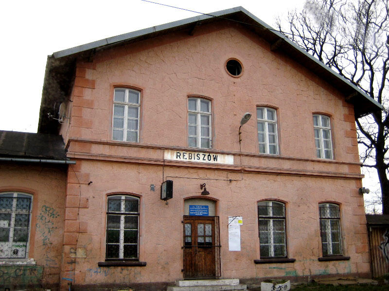 Stacja kolejowa Rębiszów